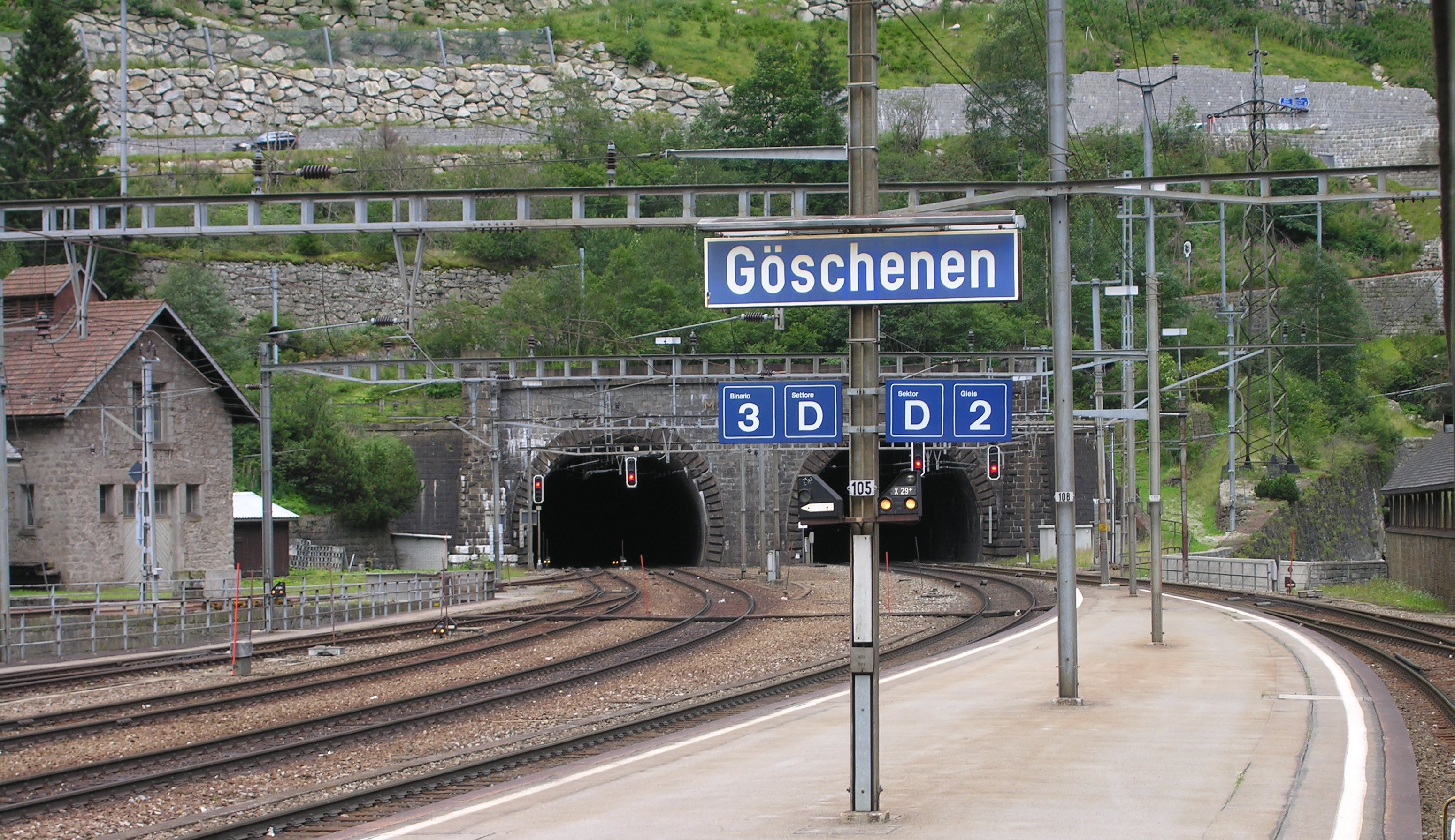 Gothard rail tunnel, entry from the Zurich side Traforo del Gottardo, dal lato di Zurigo.